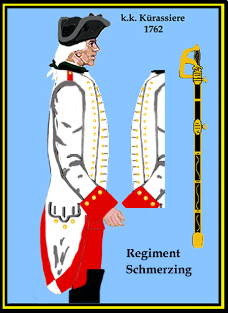 Österreichisches Kürassier-Regiment „Schmerzing“ (Aus: L.& F. Funcken - „L'Uniforme et les Armes des soldats de la guerre en dentelle II“) Castermann (Tournai 1976)